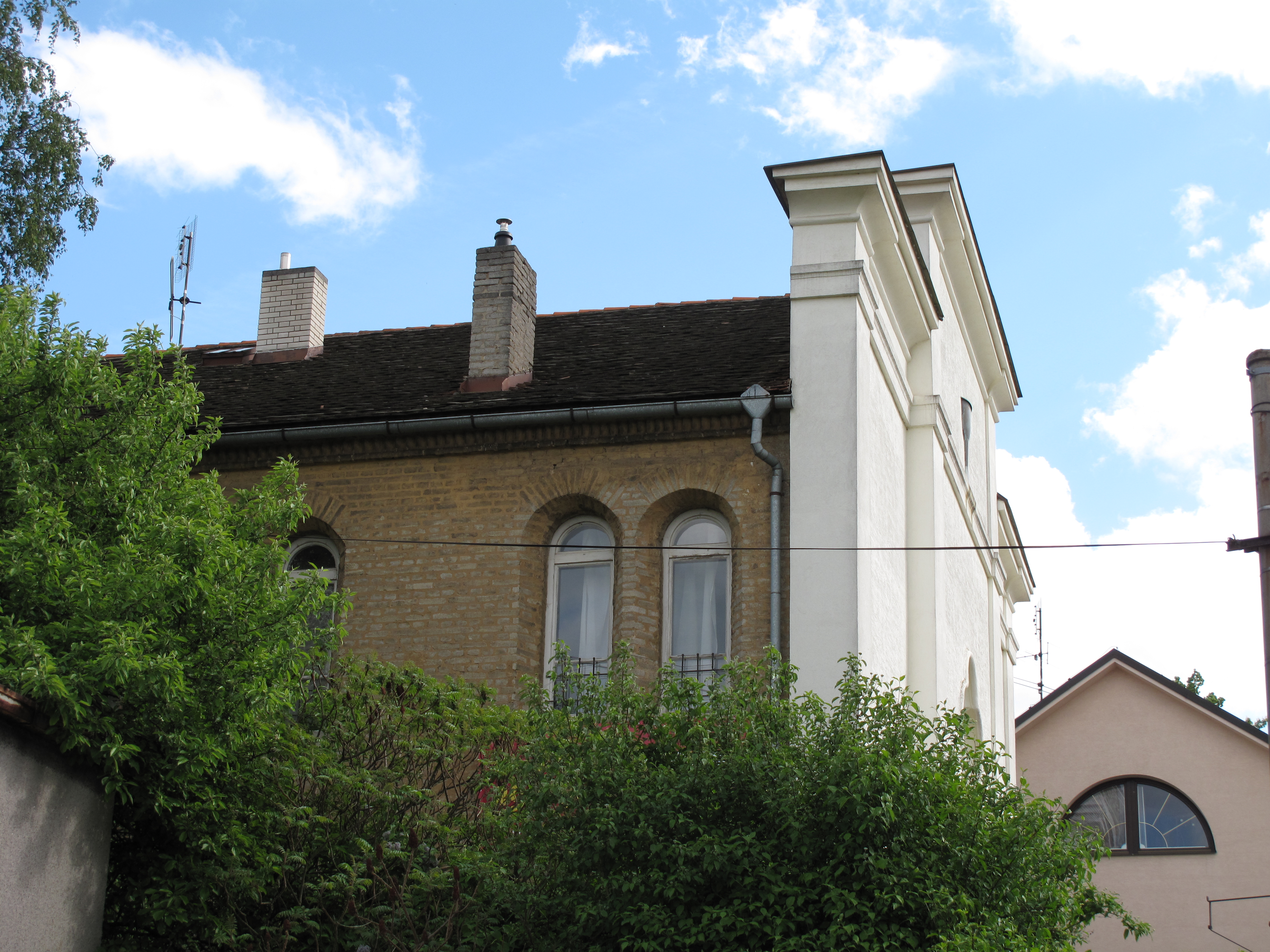 Okna synagogy v Hořovicích. Okres Beroun, Česká republika.